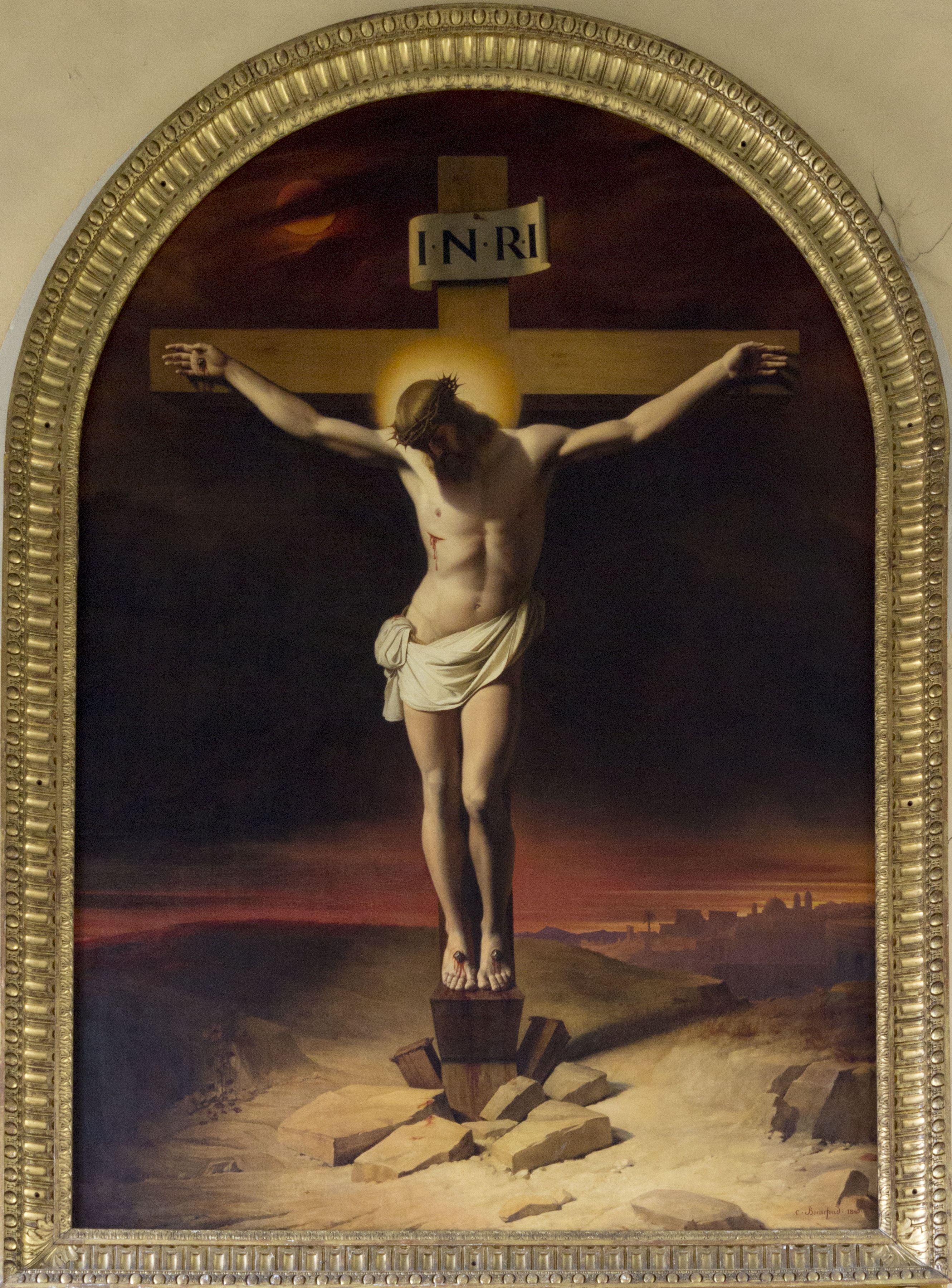 Peinture de Claude Bonnefond dans la Chapelle du Vinatier à Bron.